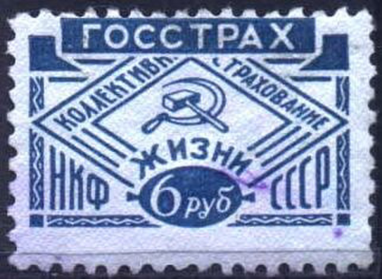 Страховая марка СССР, ГОССТРАХ